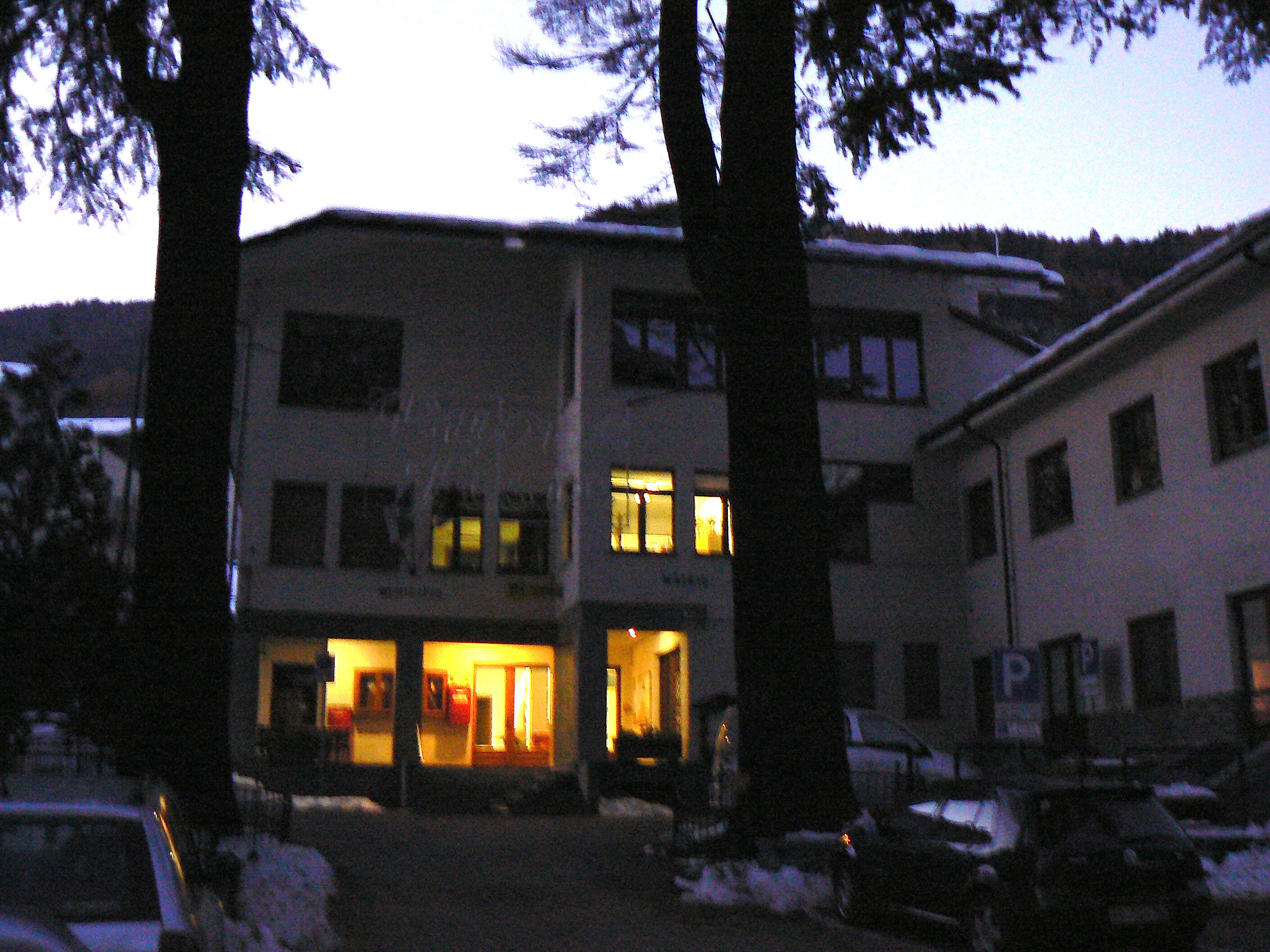 Municipio, Quincod, Challand-Saint-Anselme, Valle d'Aosta, Italia.